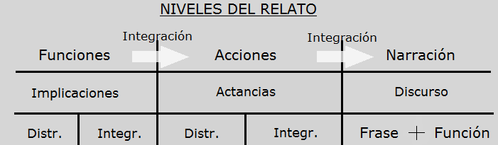 Los tres niveles de análisis del relato propuestos por Roland Barthes en su texto "Introducción al análisis estructural de los relatos" de 1996.